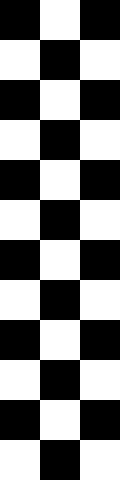 Svart og hvit er skaens farger.